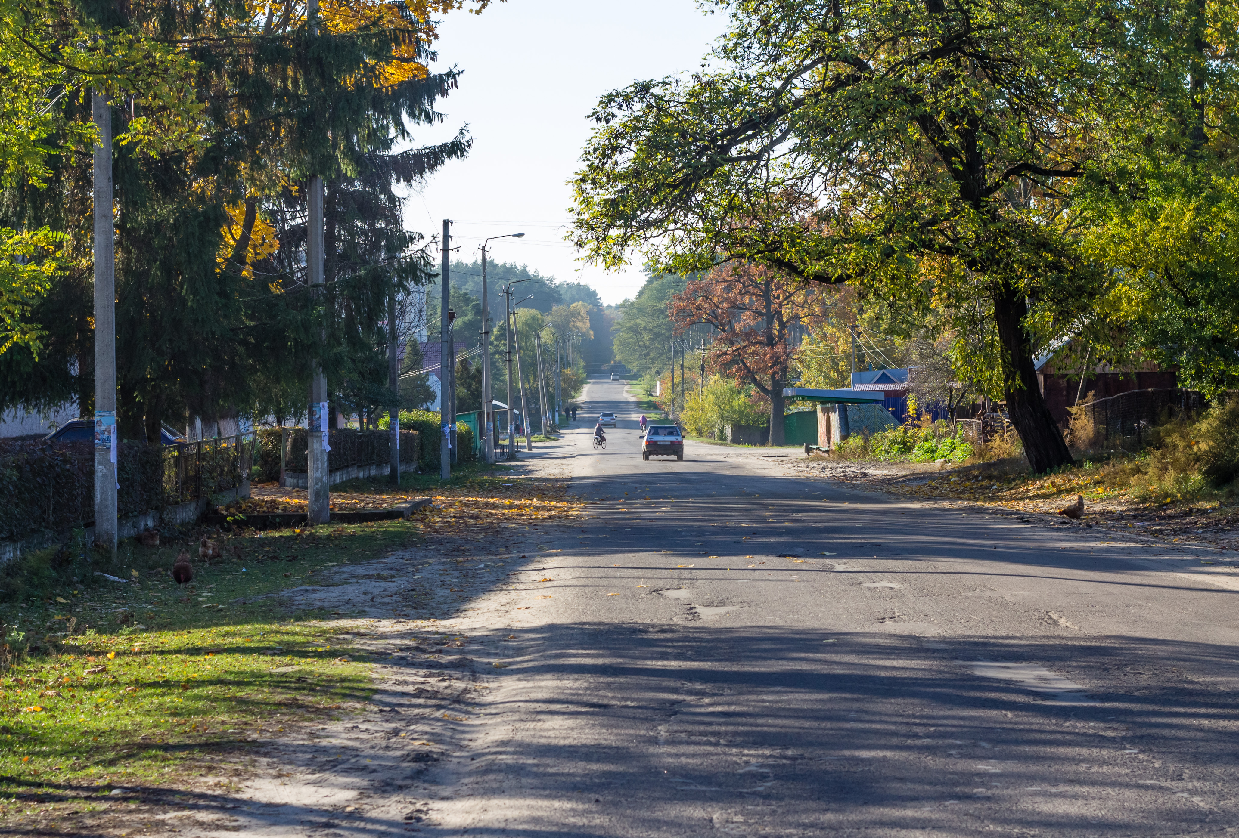 Центральна вулиця селища